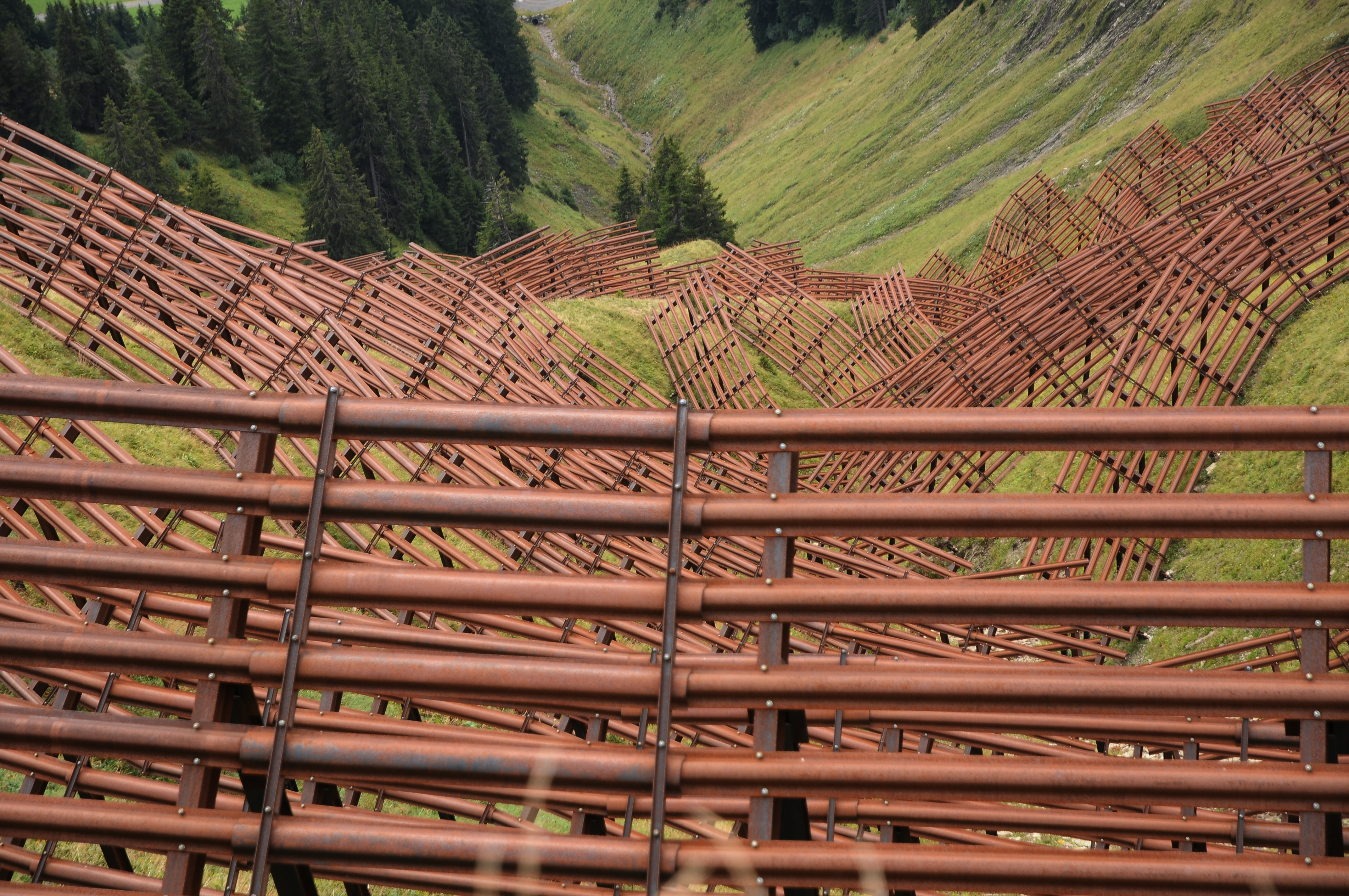 Stahlschneebrücken (Lawinenfangzäune) auf der Höferspitze in Schröcken.